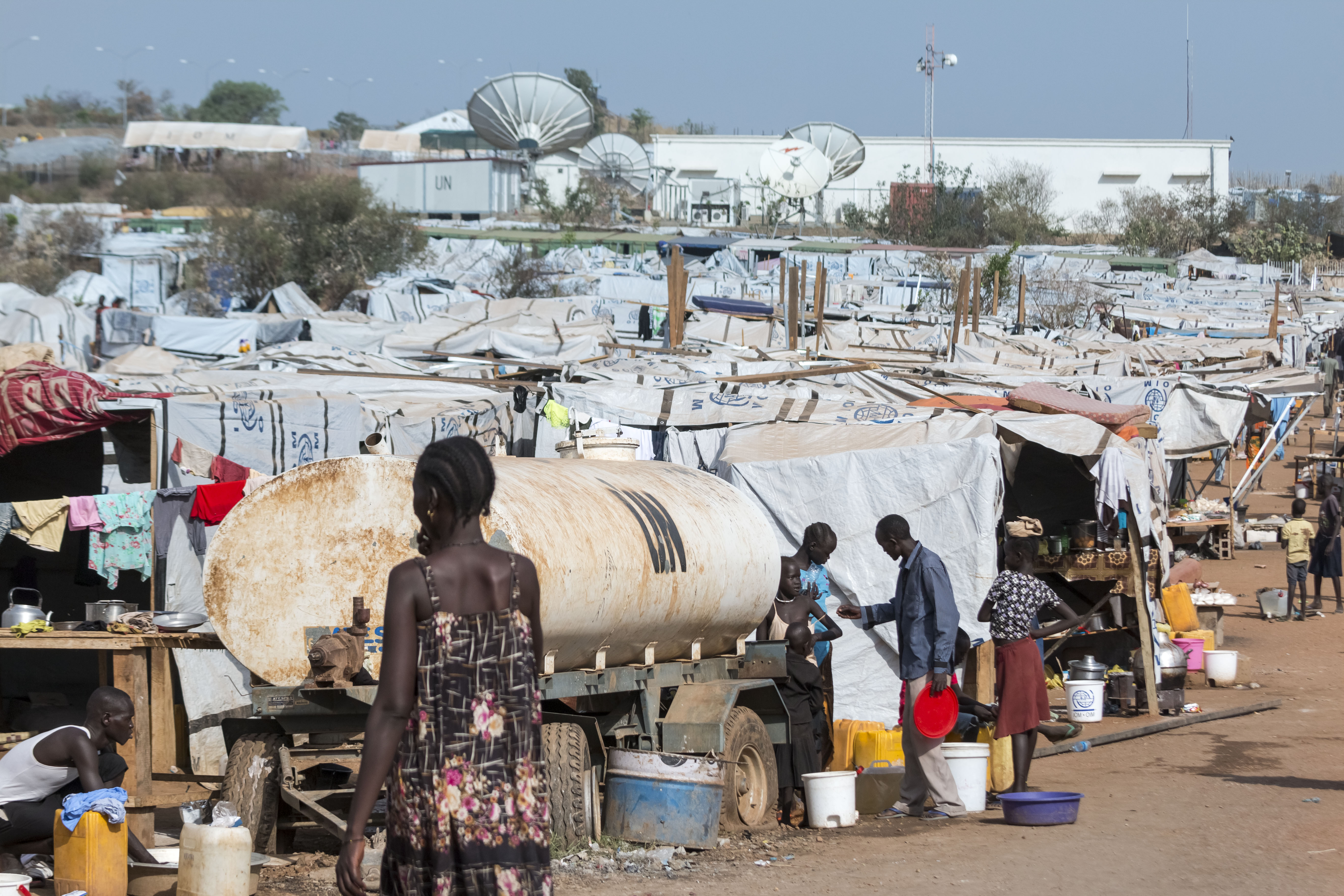 South Sudan, Zuid Sudan, Zuid Soedan, FEB 2014 UN house vluchtelingenkamp, voornamelijk voor Nuer ontheemden. foto: Petterik Wiggers/Hollandse Hoogte